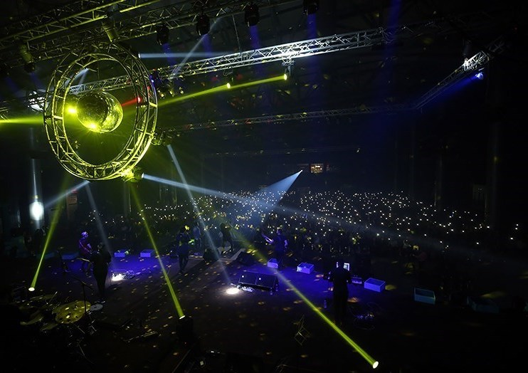 کنسرت بهنام بانی در کیش